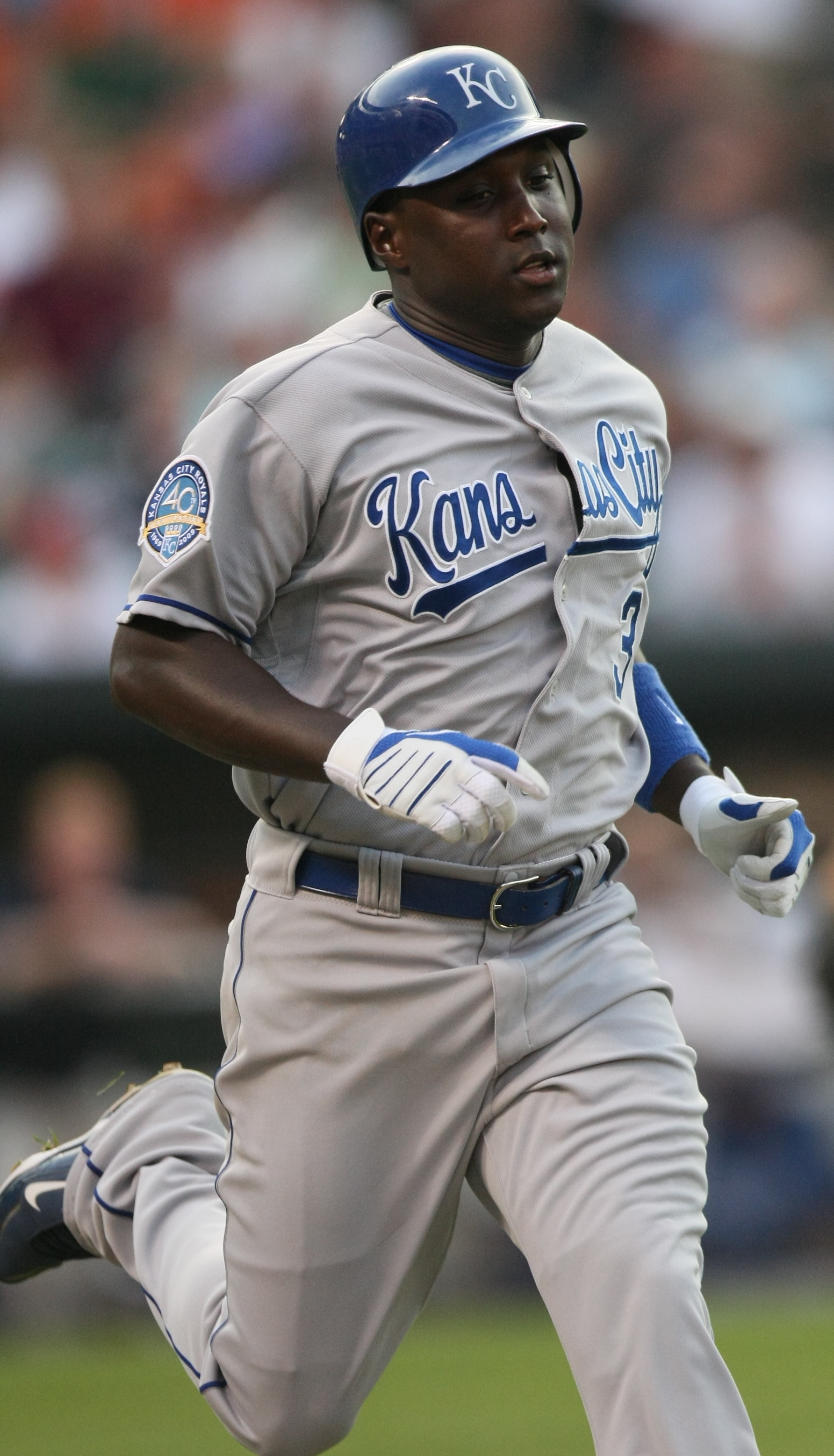 Yuniesky Betancourt